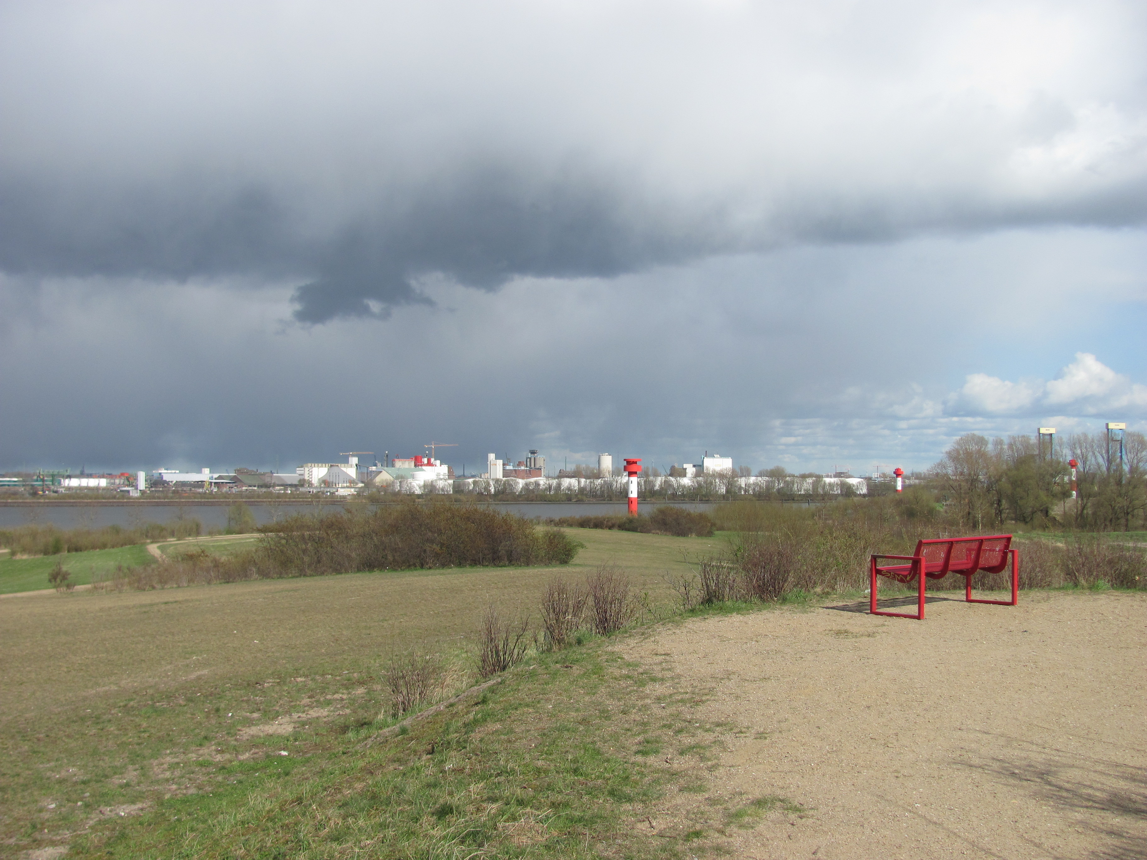 Blick vom höchsten Punkt des Moorburger Berges in Hamburg Richtung Osten auf die Hohe Schaar (Wilhelmsburg)